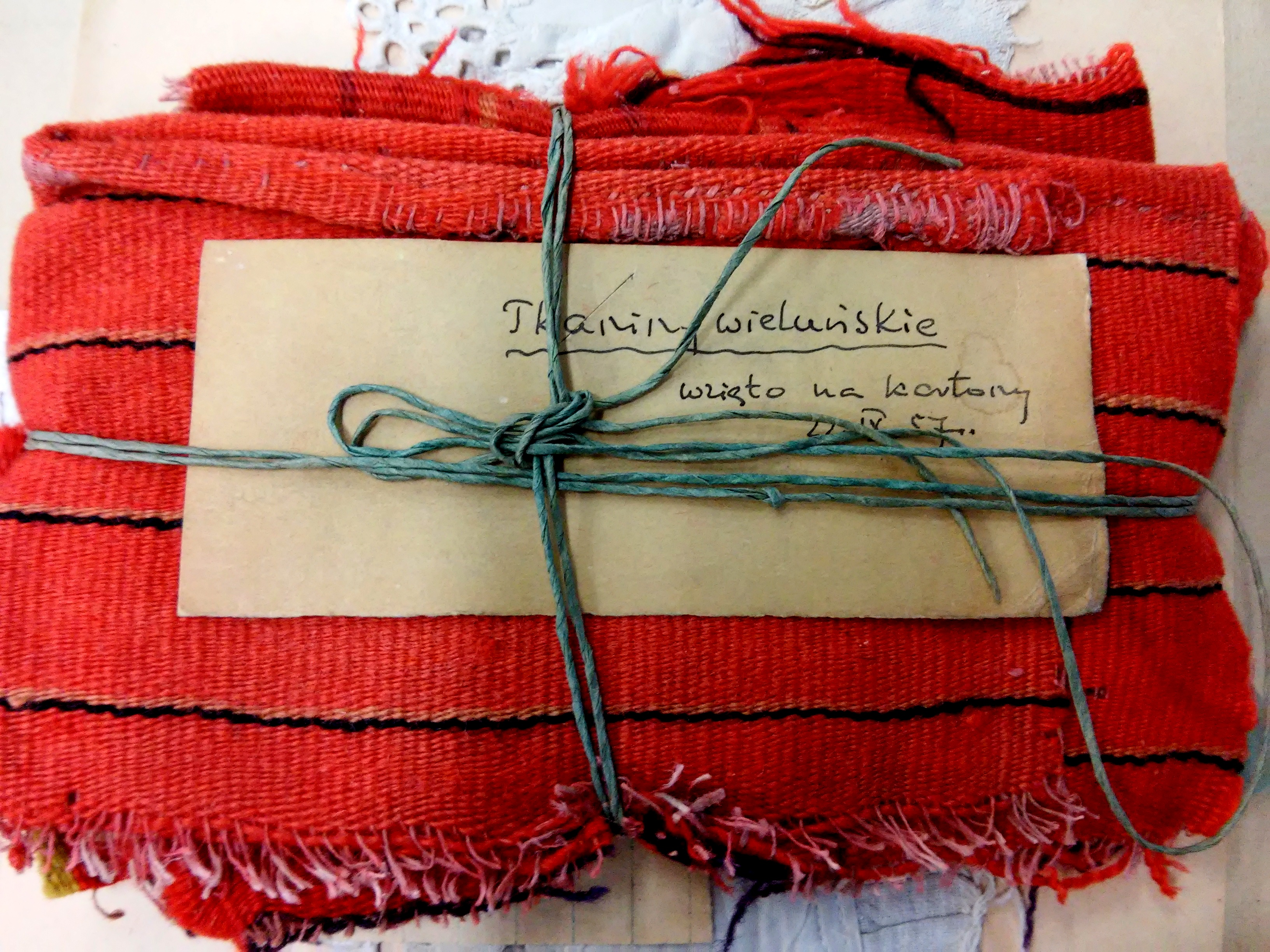 Dokumentacja terenowa znajdująca się w zbiorach Archiwum Polskiego Towarzystwa Ludoznawczego we Wrocławiu